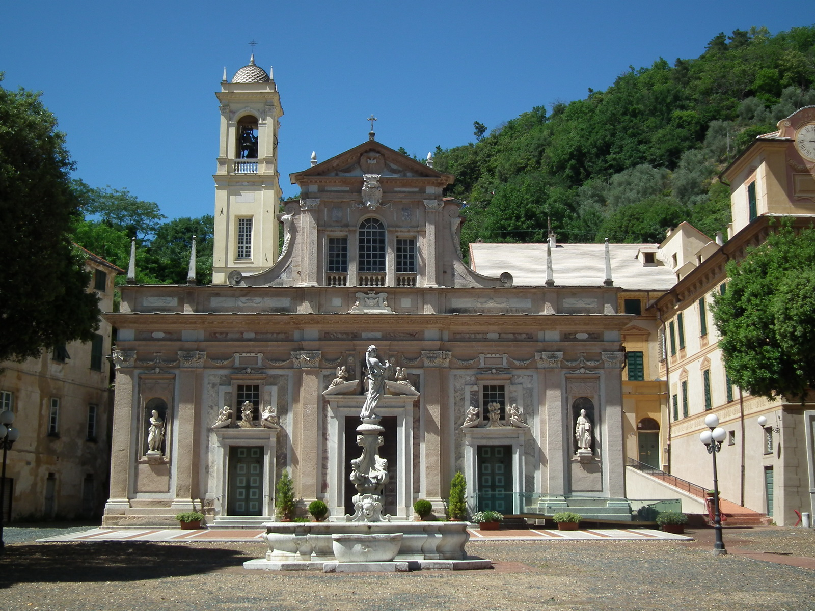 Sanctuary of Nostra Signora della Misericordia Native nameSantuario di Nostra Signora della MisericordiaLocationSavona, ItalyCoordinates44° 20′ 40.75″ N, 8° 26′ 02.93″ E Established1536 (Began construction)